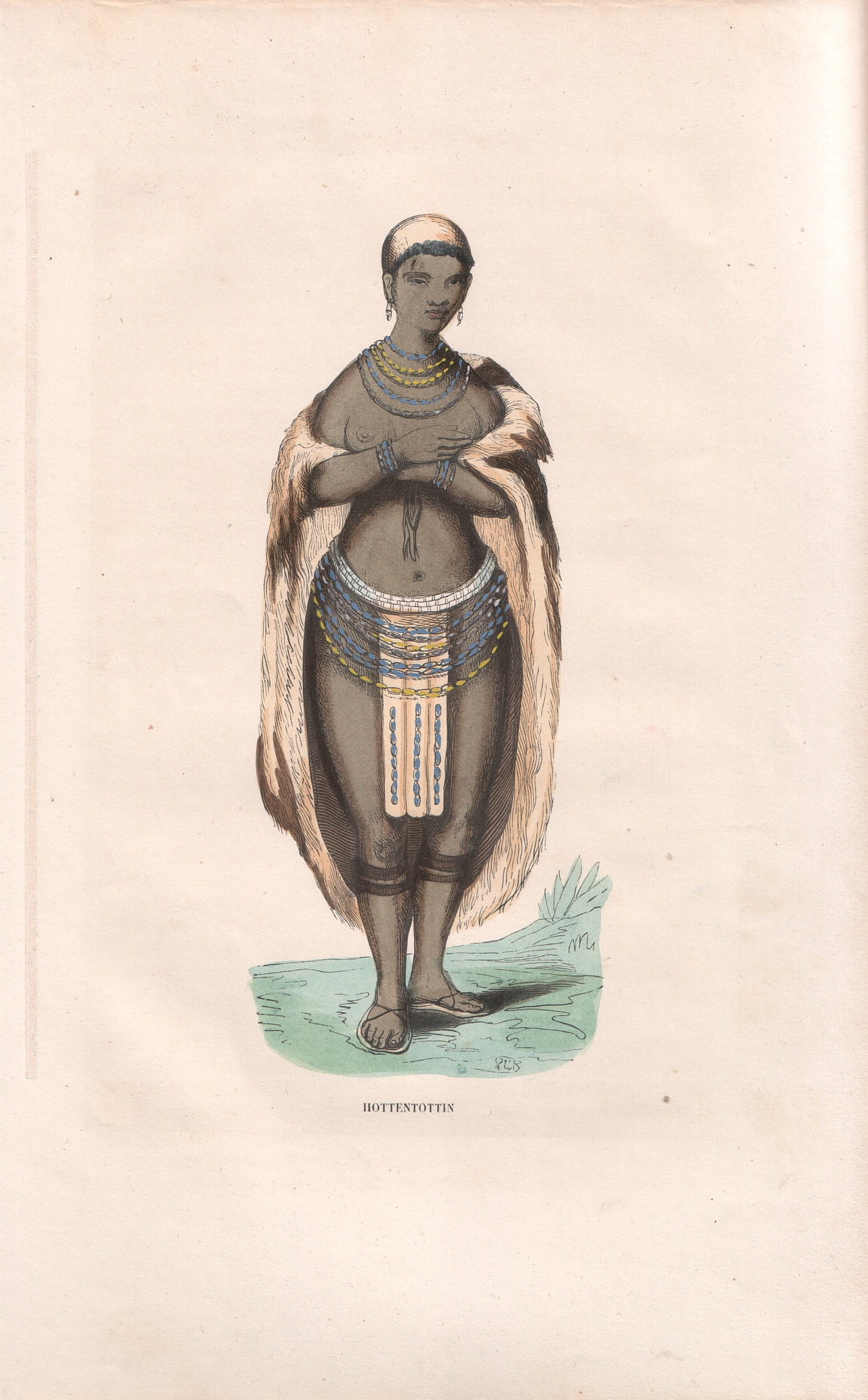 Hottentottin Kolorierte Lithografie.